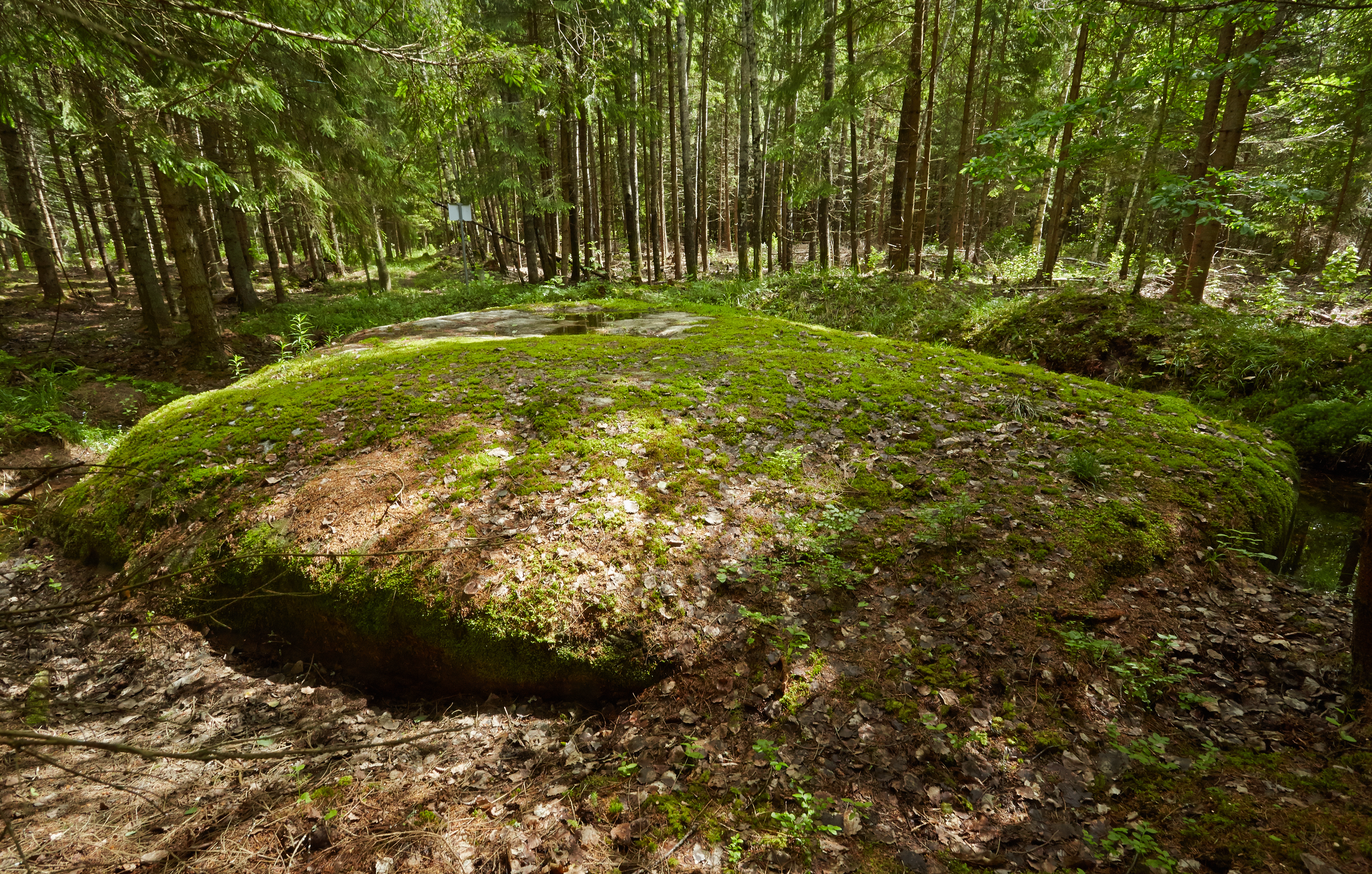 Lagjakivi (Laagri rändrahn; Sassikivi)